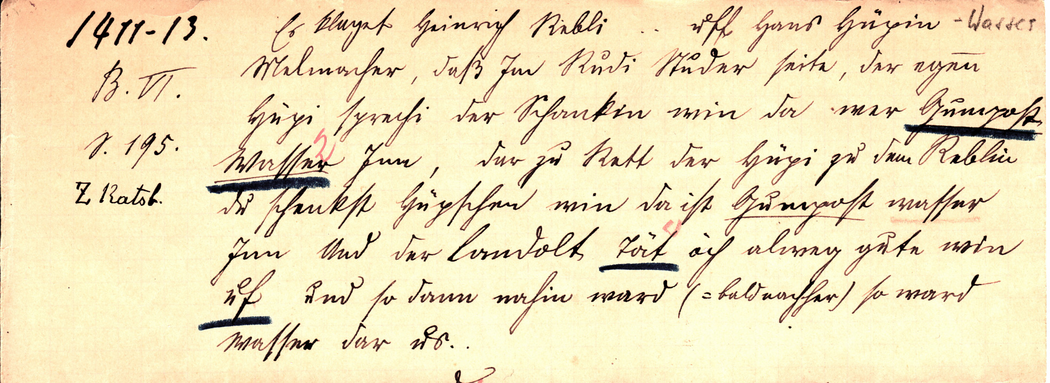 Belegzettel des Schweizerischen Idiotikons: Anfang des 20. Jh. angefertigte Abschrift eines Gerichtsprotolls aus dem Zürcher Rats- und Richtebuch von 1411/13